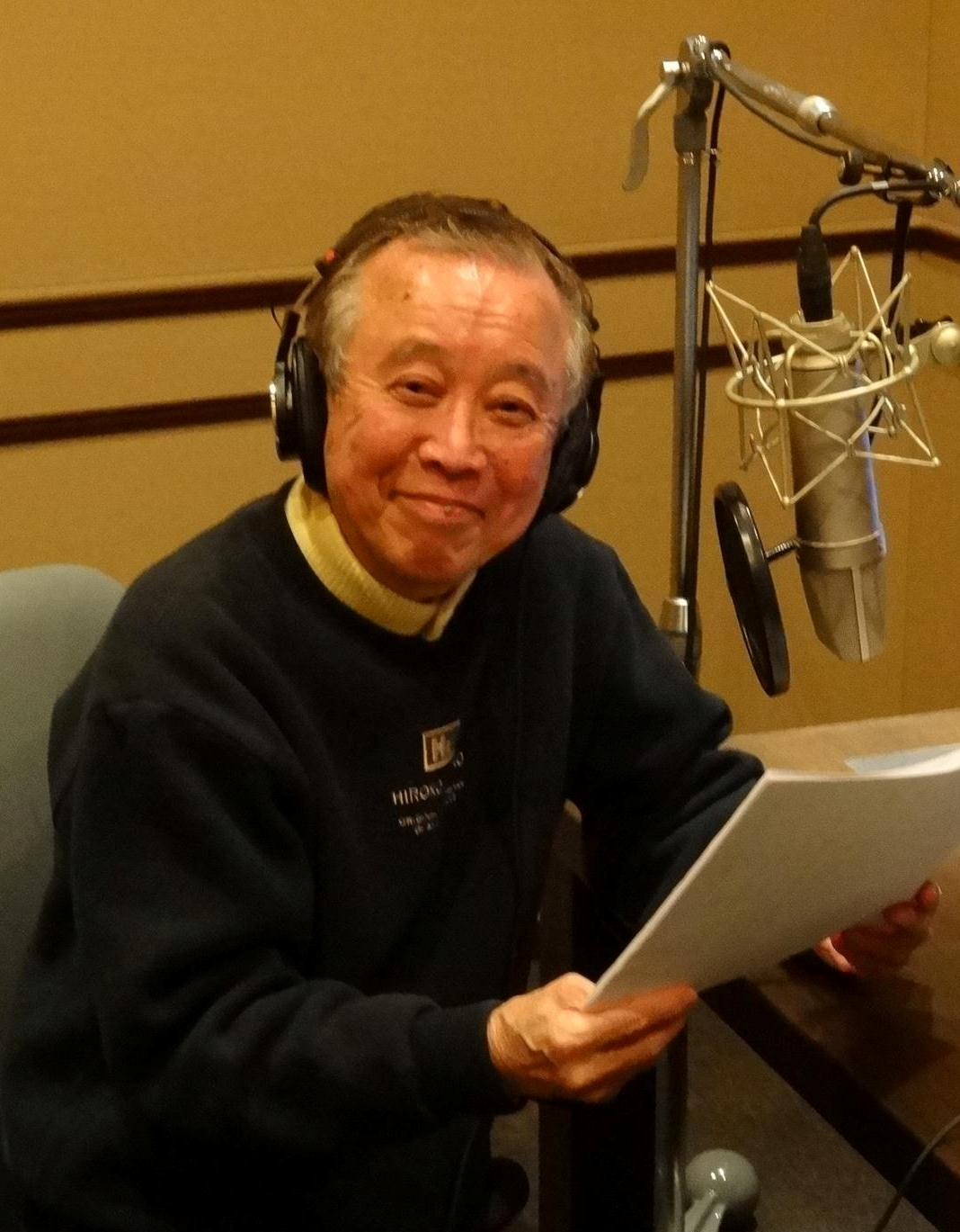 マックレイ西麻布スタジオにて